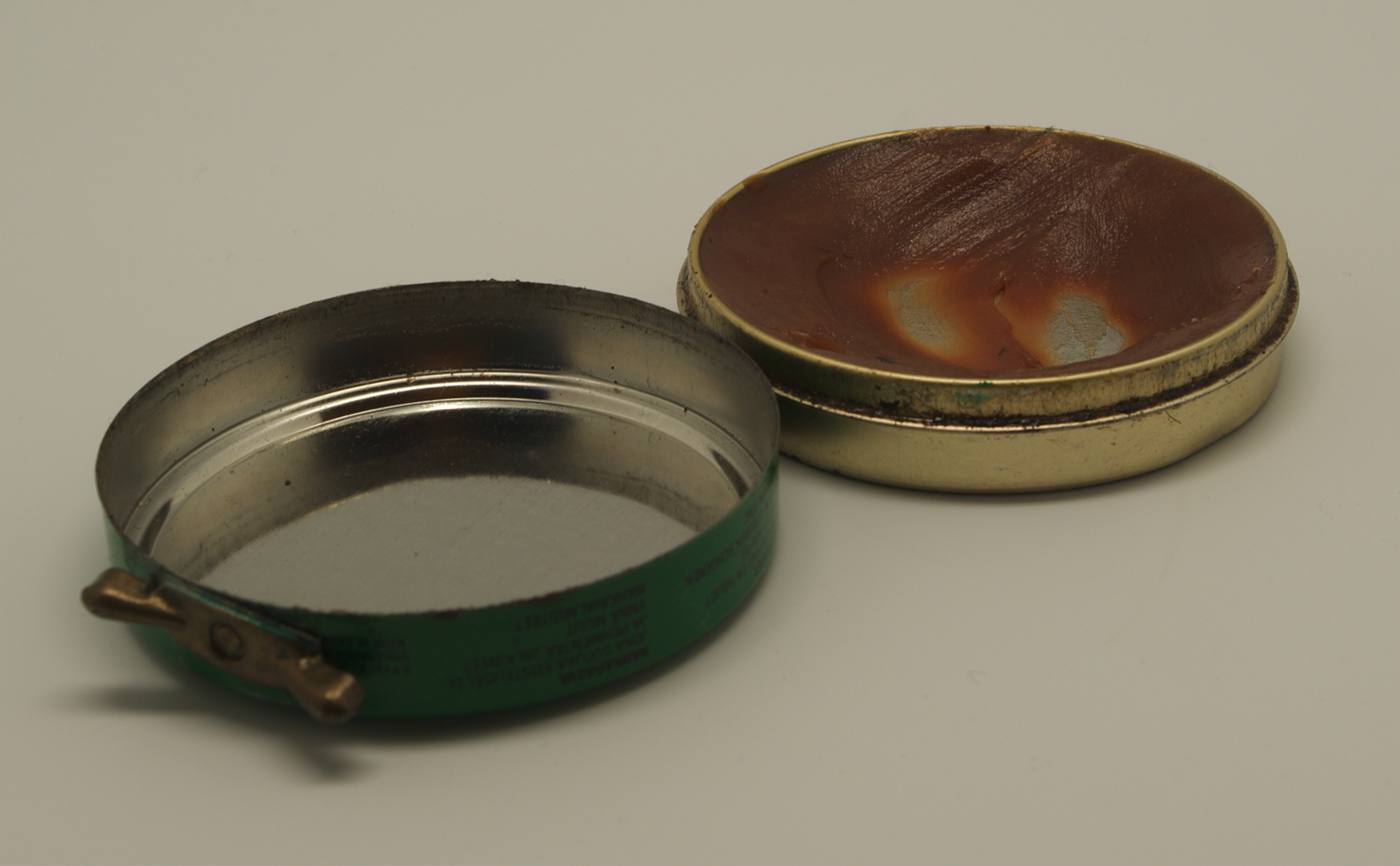 Boite de graisse Le Phoque pour nourrir le cuir